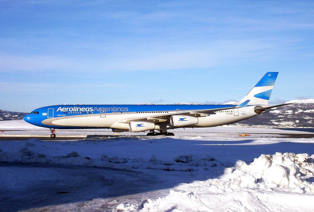 Airbus A340-300X de Aerolíneas Argentinas matricula LV-CSD, en rodaje para estacionar en la terminal del Aeropuerto Internacional Malvinas Argentinas de Ushuaia, Argentina.